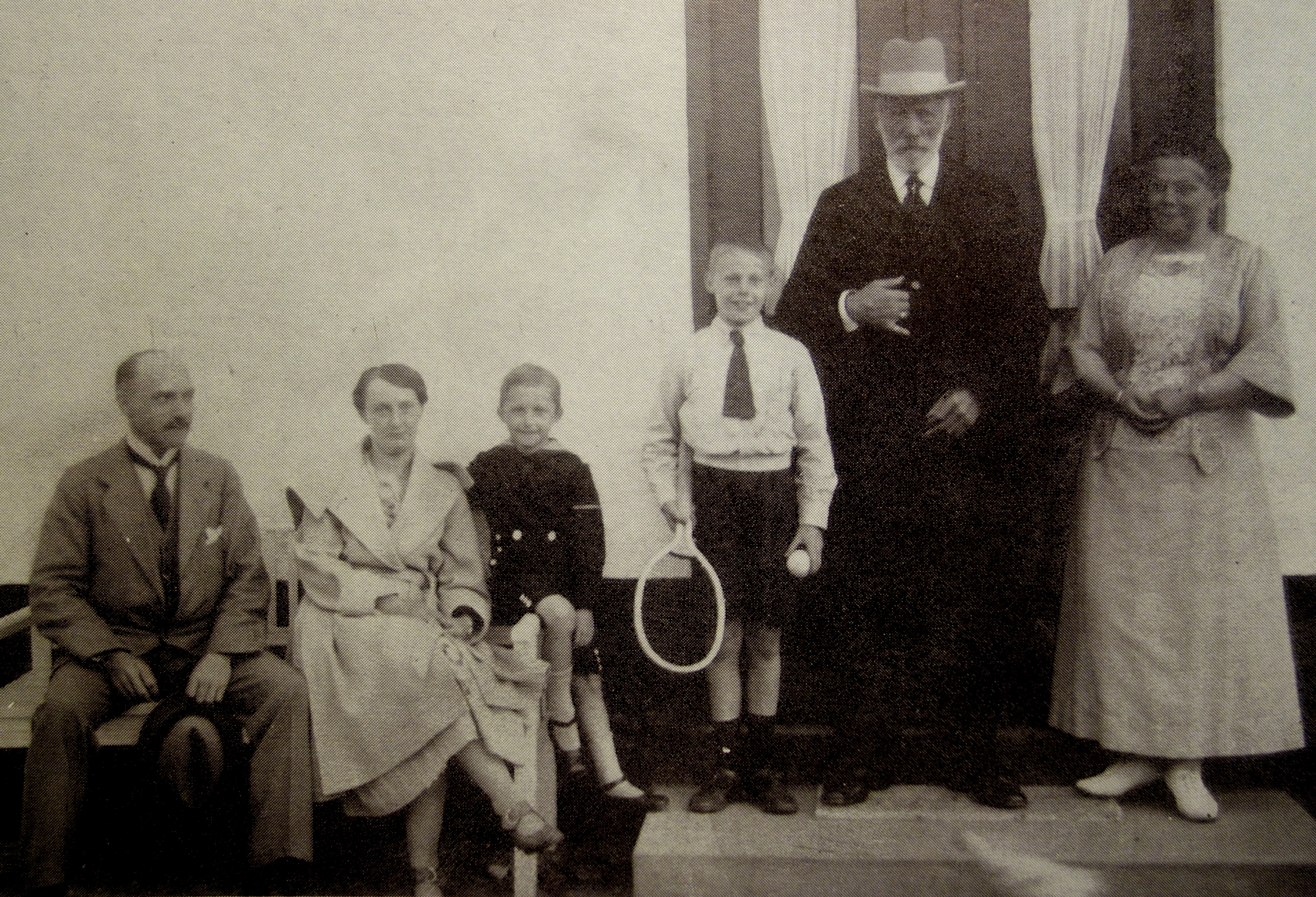 Johan Hansen med familie foran sin sommerbolig på Nordborg Slot